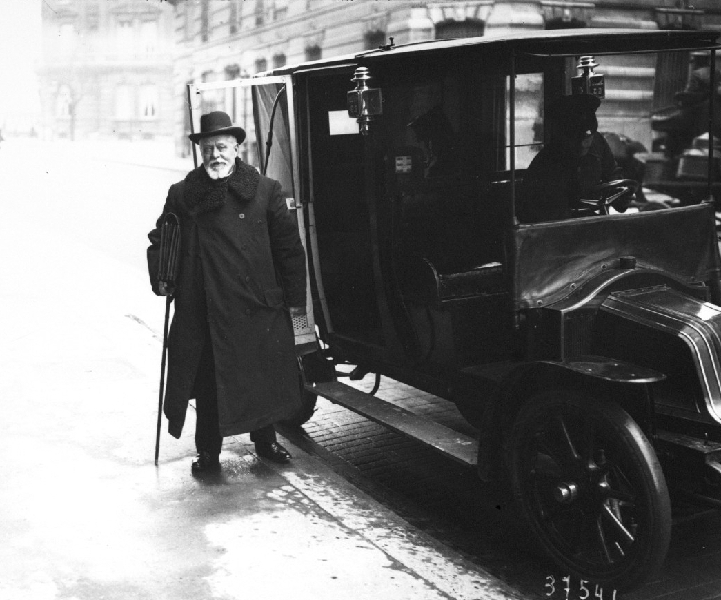 Mr de Folleville (dans la rue)